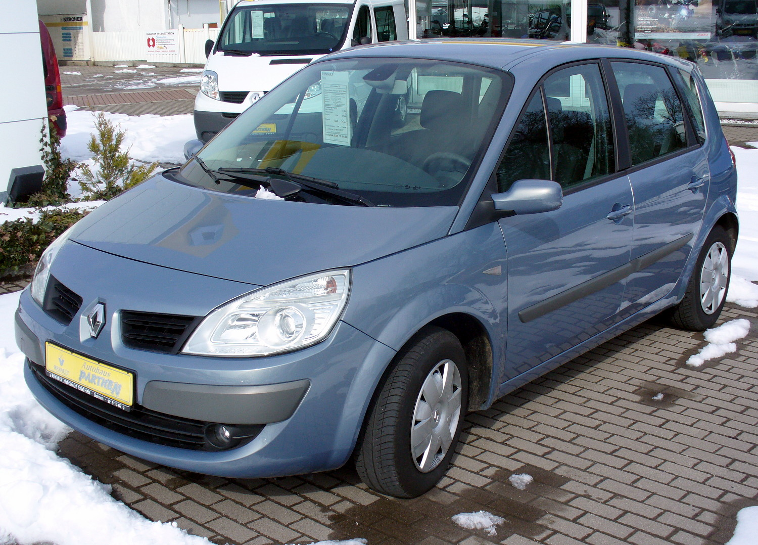 Renault Scénic II Phase II